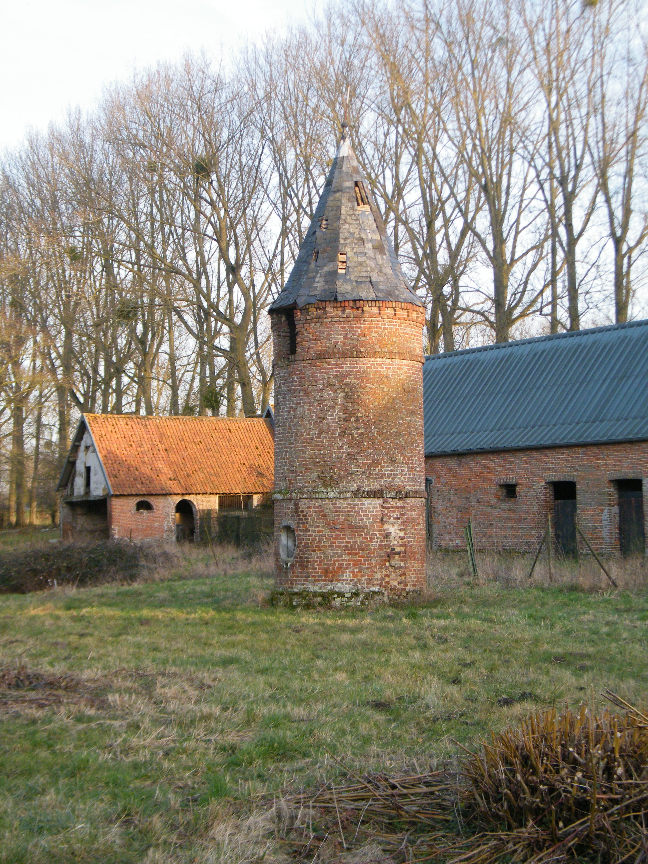 Bernay, Somme, Fr, colombier près de l'église.